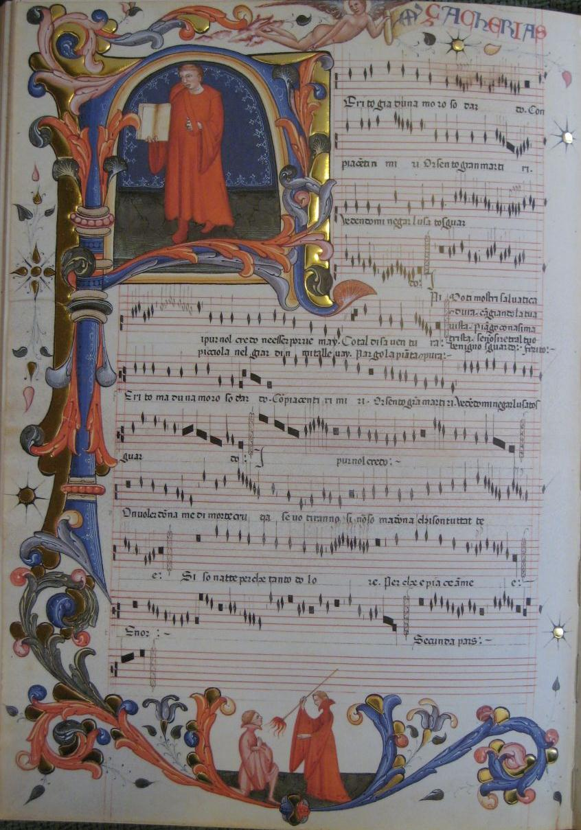 Ferito m'ha' d'un amoroso dardo, Codex Squarcialupi